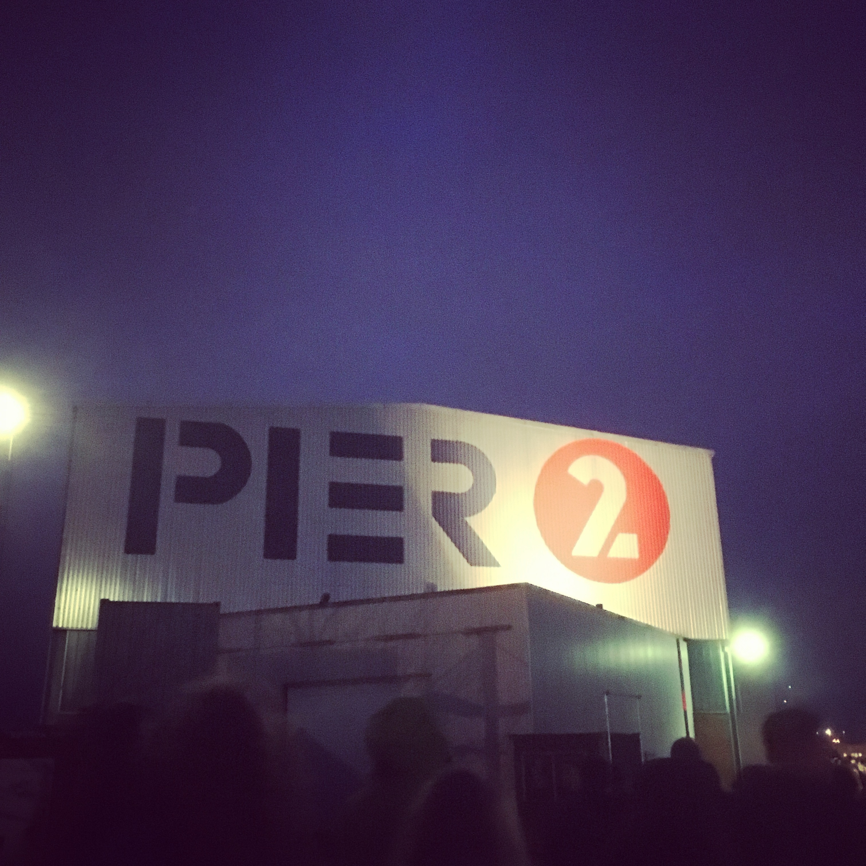 Bremer Pier 2 während einer Veranstaltung bei Nacht